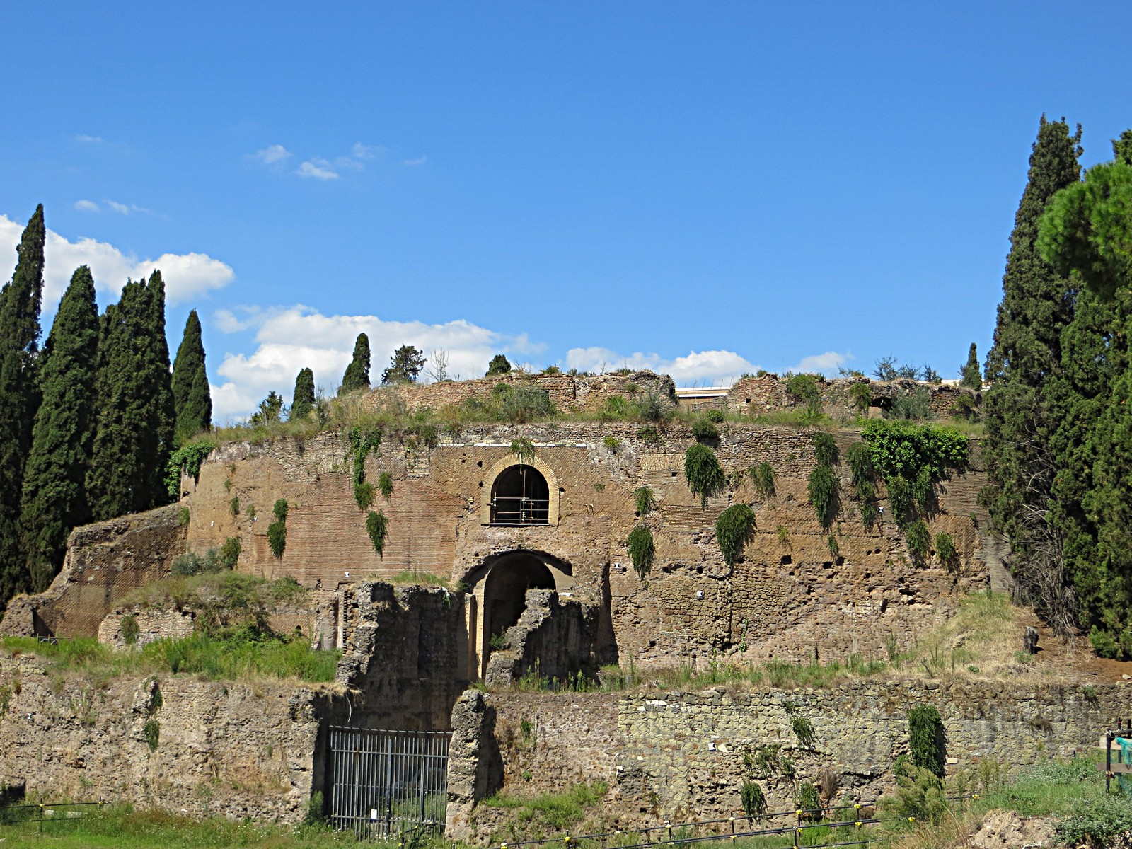 Mausoleo di Augusto